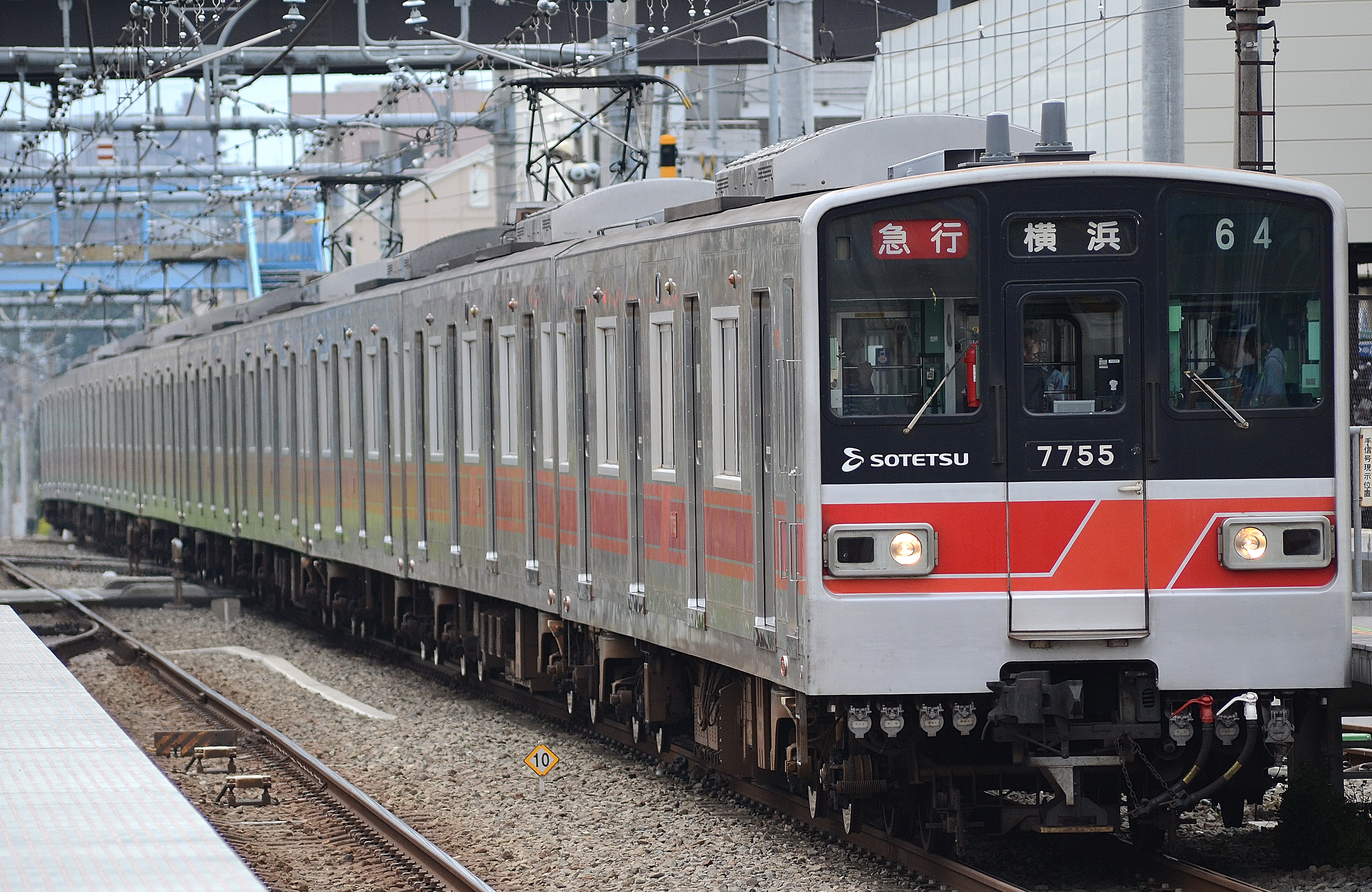 相模鉄道70０0系電車